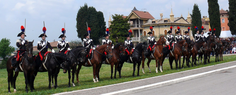 Pastrengo -Vr- anniversario della Carica dei Carabinieri - drappello a cavallo